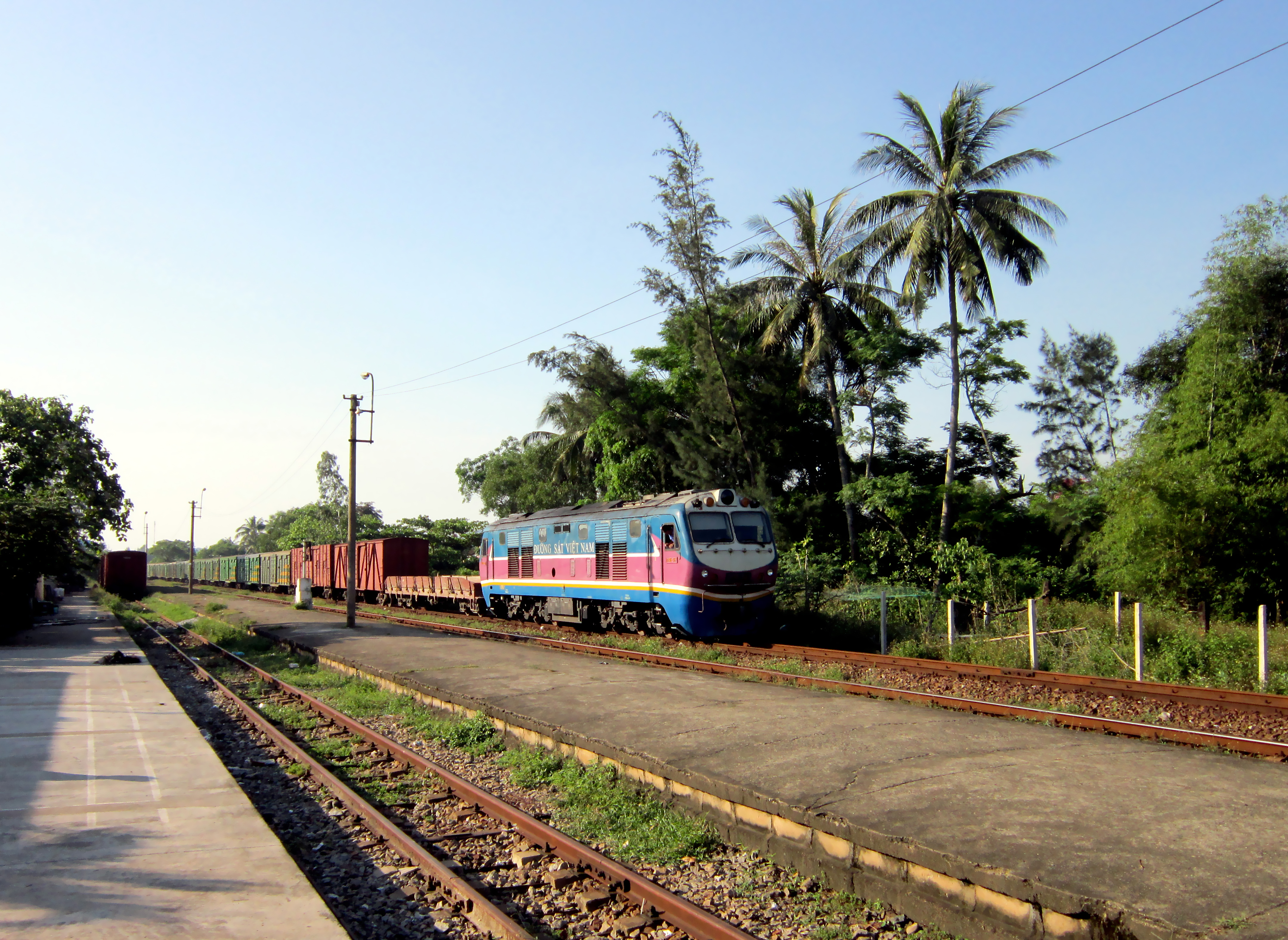 Tàu hỏa vào Ga Núi Thành ở phía Nam của tỉnh Quảng Nam, Việt Nam.